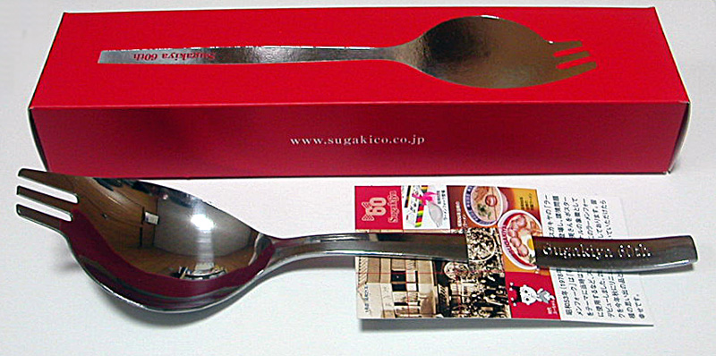 撮影者：小太刀 スガキヤのラーメンフォーク。スガキヤ60周年記念行事の一環として2006年5月3日～7日の期間にラーメンセット注文客に配布されたもの。